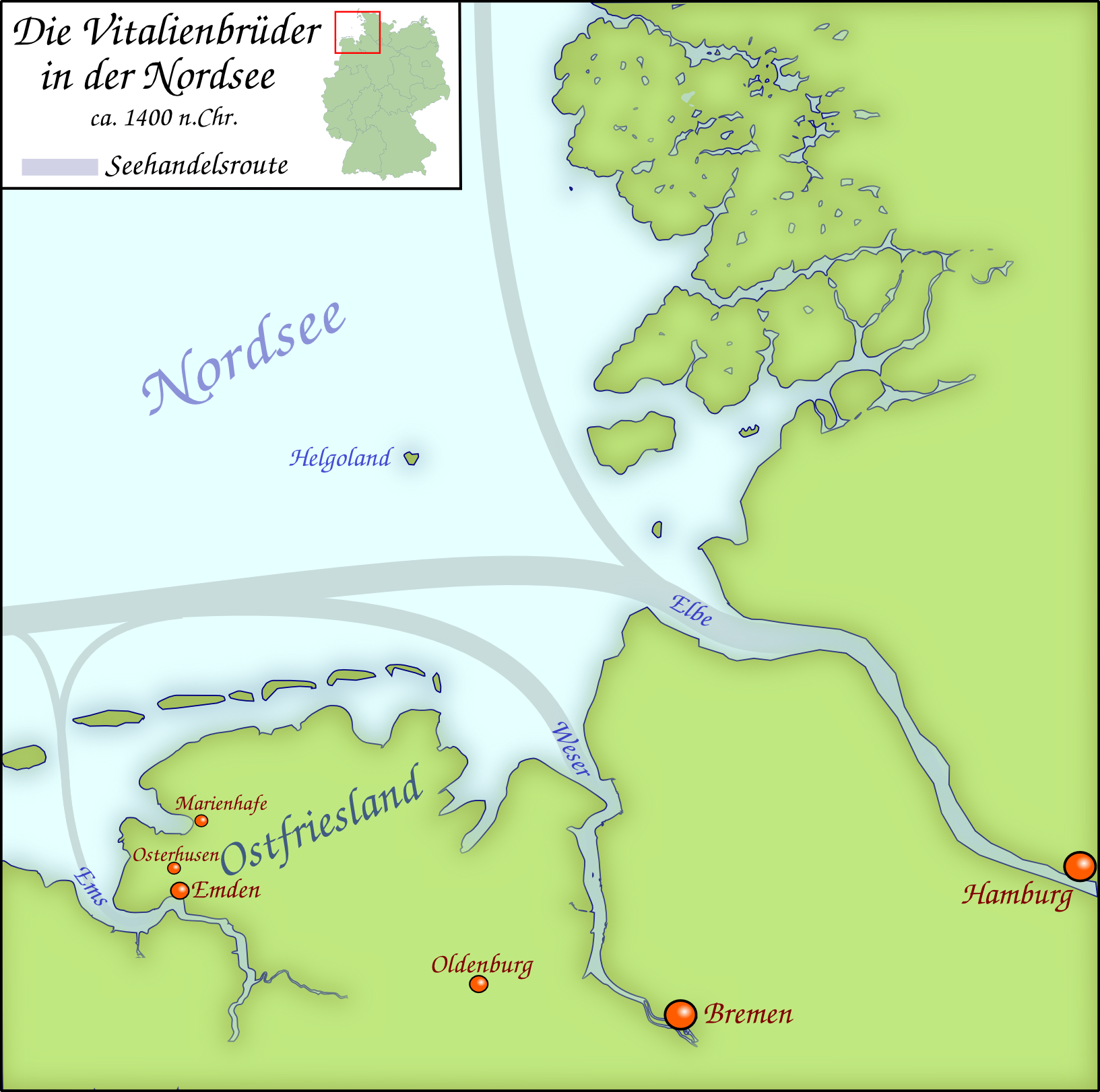 Der Nordseeraum um 1400 mit relevanten Orten im Zusammenhang mit den Vitalienbrüdern inkl. Seehandelsrouten der Hanse